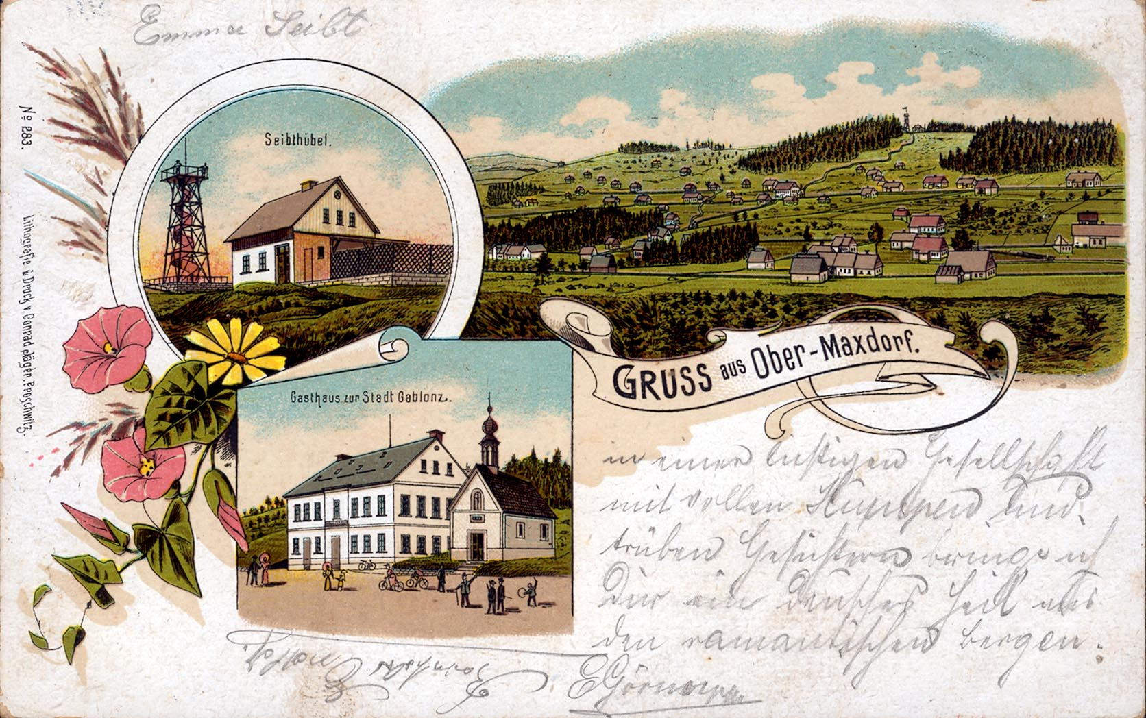 Starý Maxov